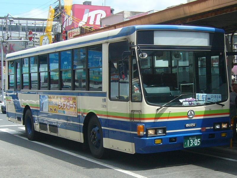 登録番号 福山22く13-05 中国バス所属 2007年5月20日 福山駅前にて撮影